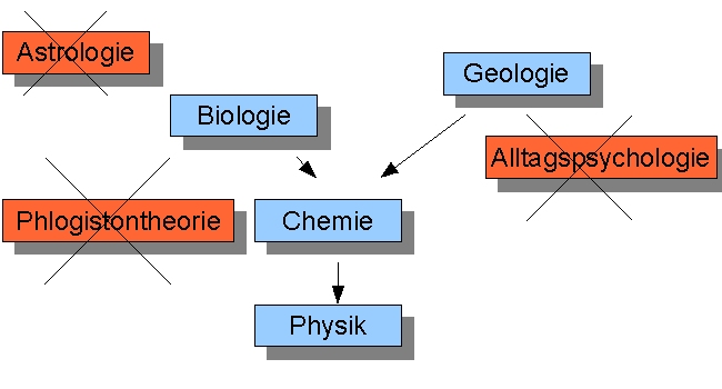 Elimi